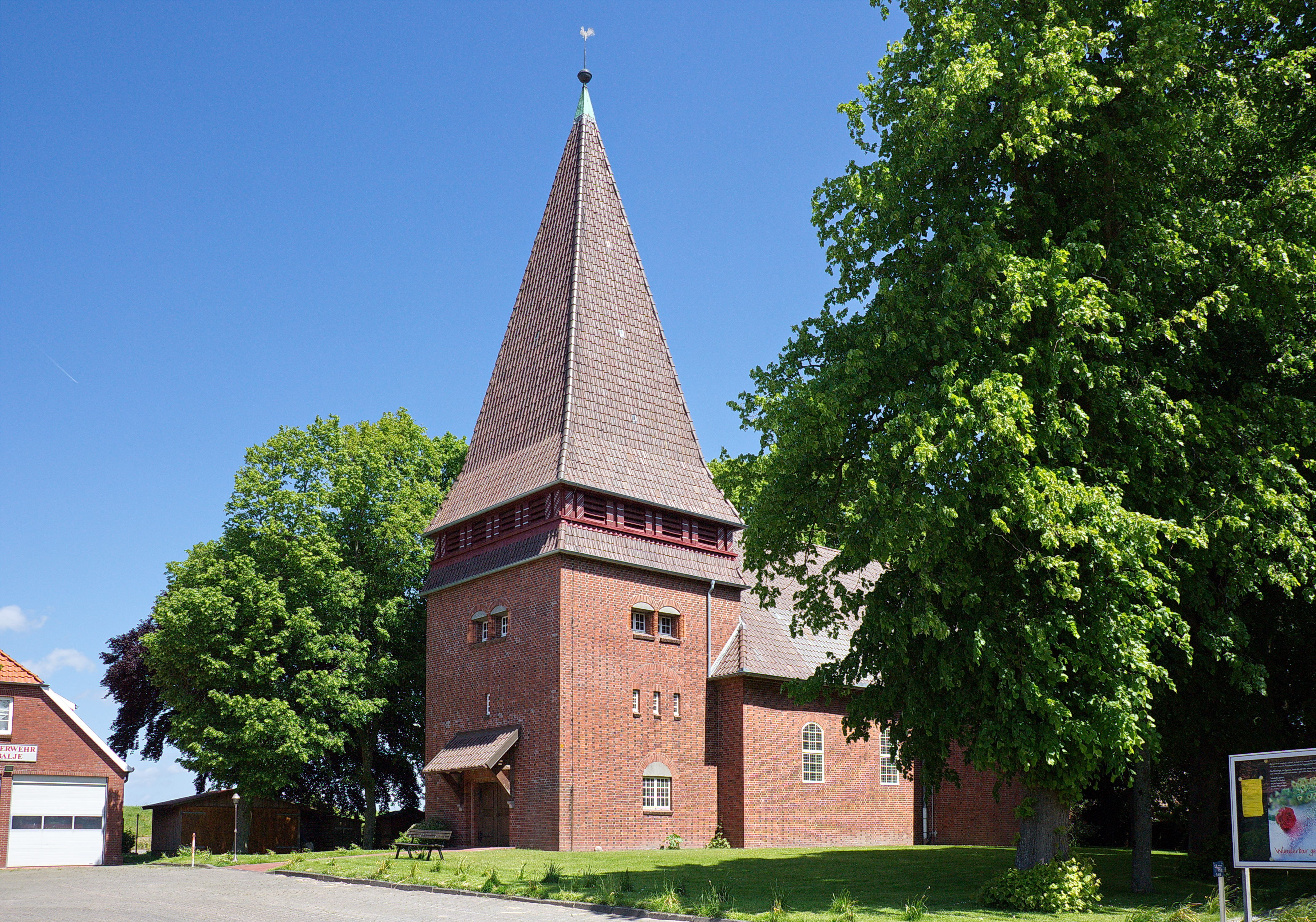 Balje zwischen Elbe und Oste in Niedersachsen, Deutschland.